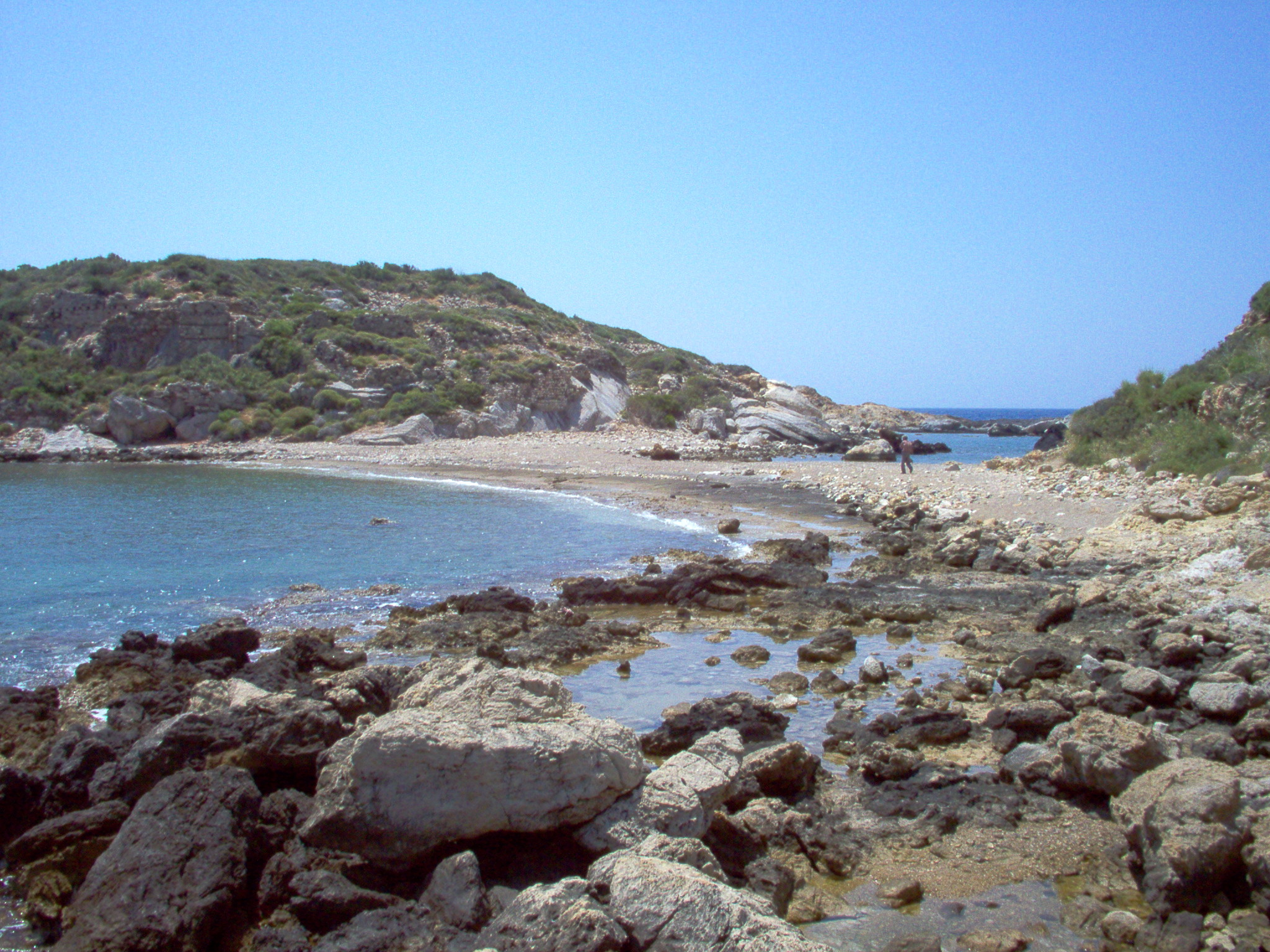 Yenikaş, Aydıncık